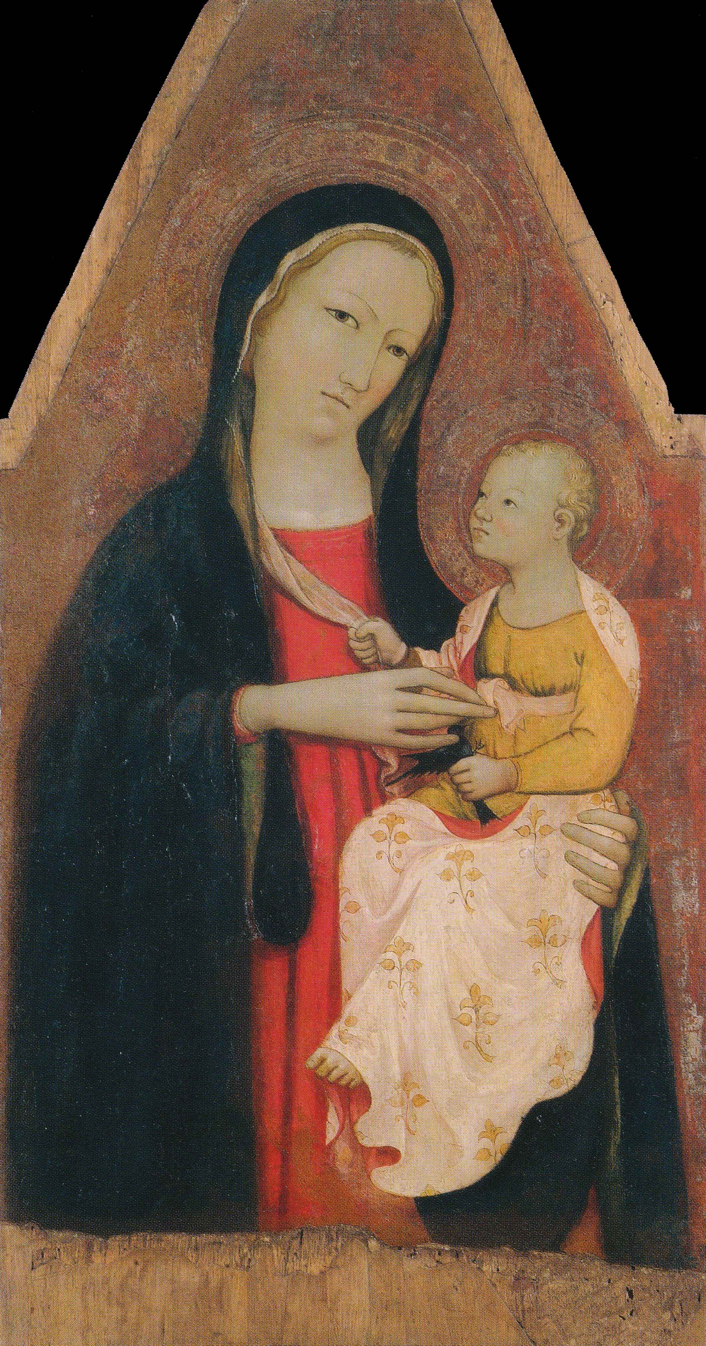 Jacopo di Rossello Franchi - Madonna col Bambino (1410-1420)